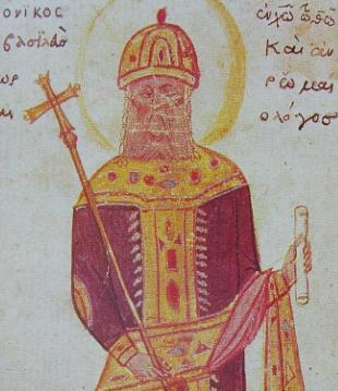 Andronikos II Palaiologos, Byzantine emperor (1282-1328)